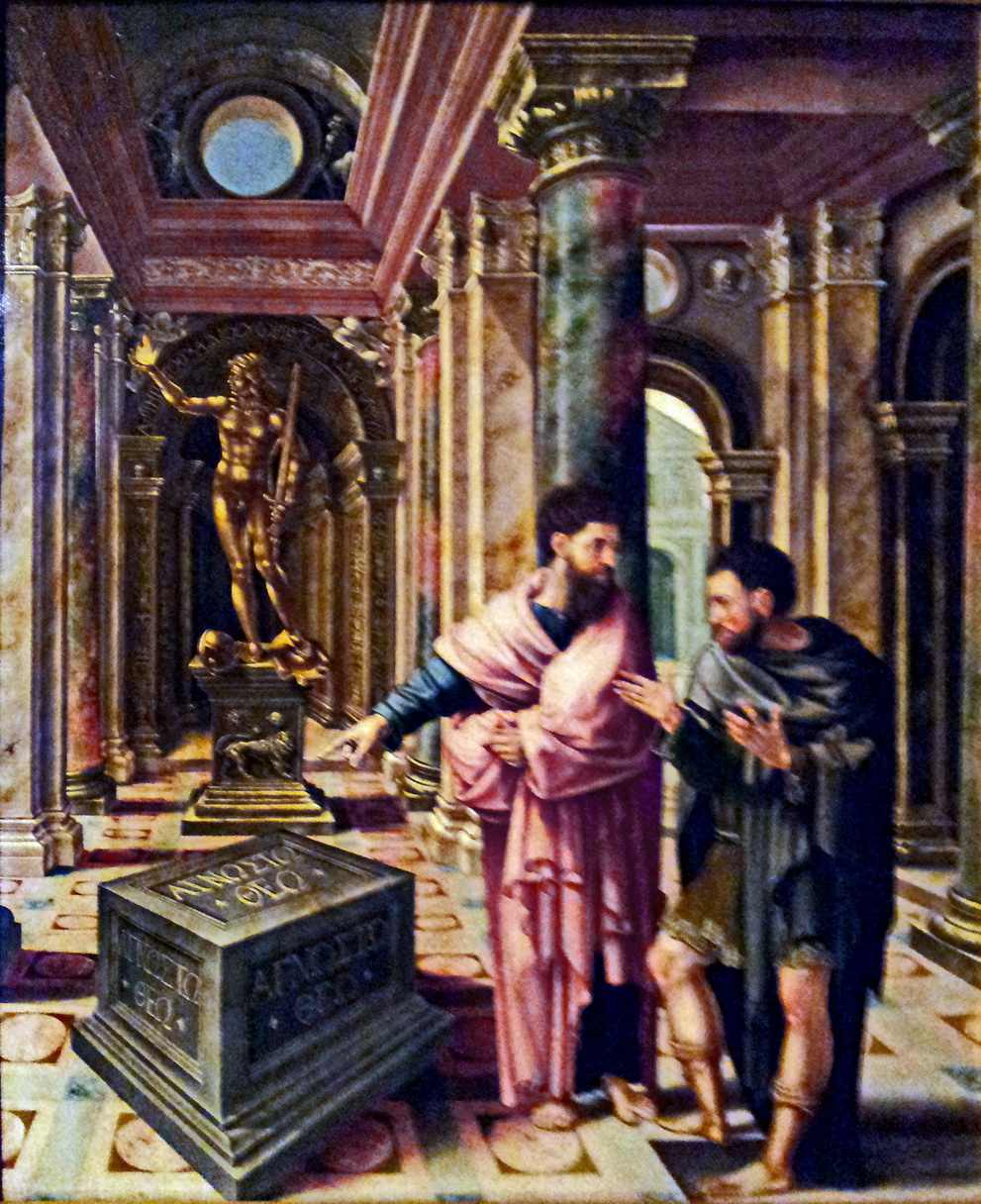 Saint Denis meets Saint Paul